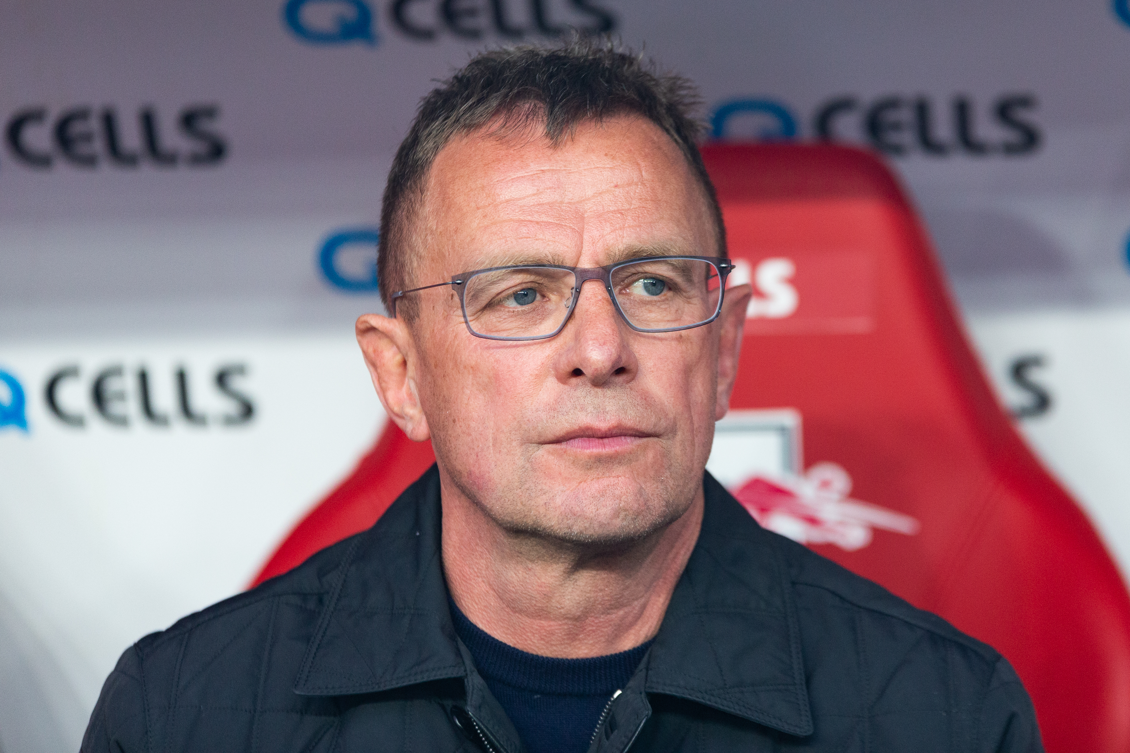 Fußball, Männer, 1. Bundesliga, RB Leipzig - Hertha BSC; Ralf Rangnick (RB Leipzig, Trainer, head coach); Porträt, Einzelbild